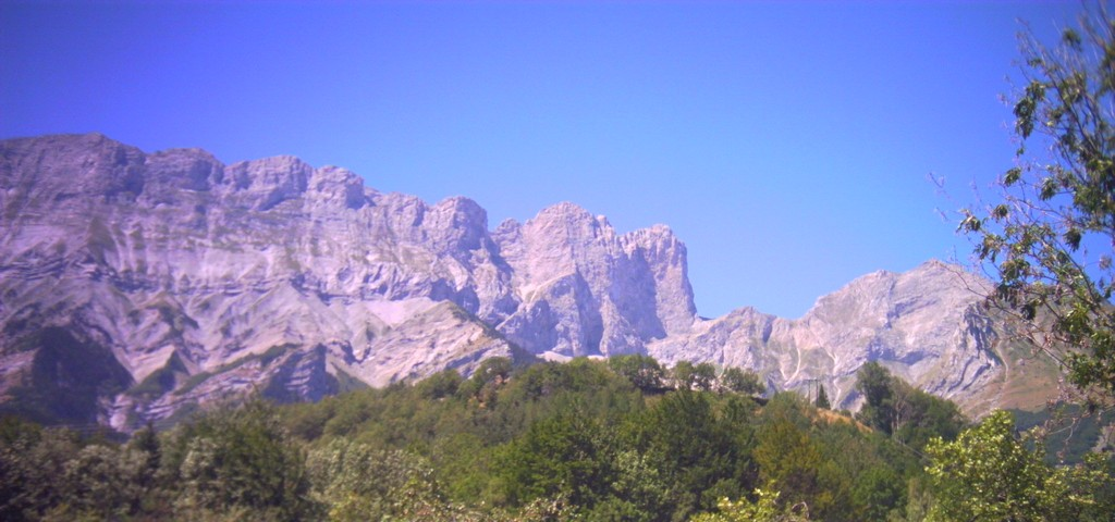 La montagne de Faraut au-dessus du Glaizil